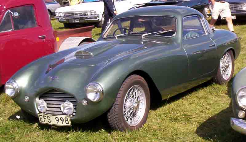 Frazer-Nash 1958